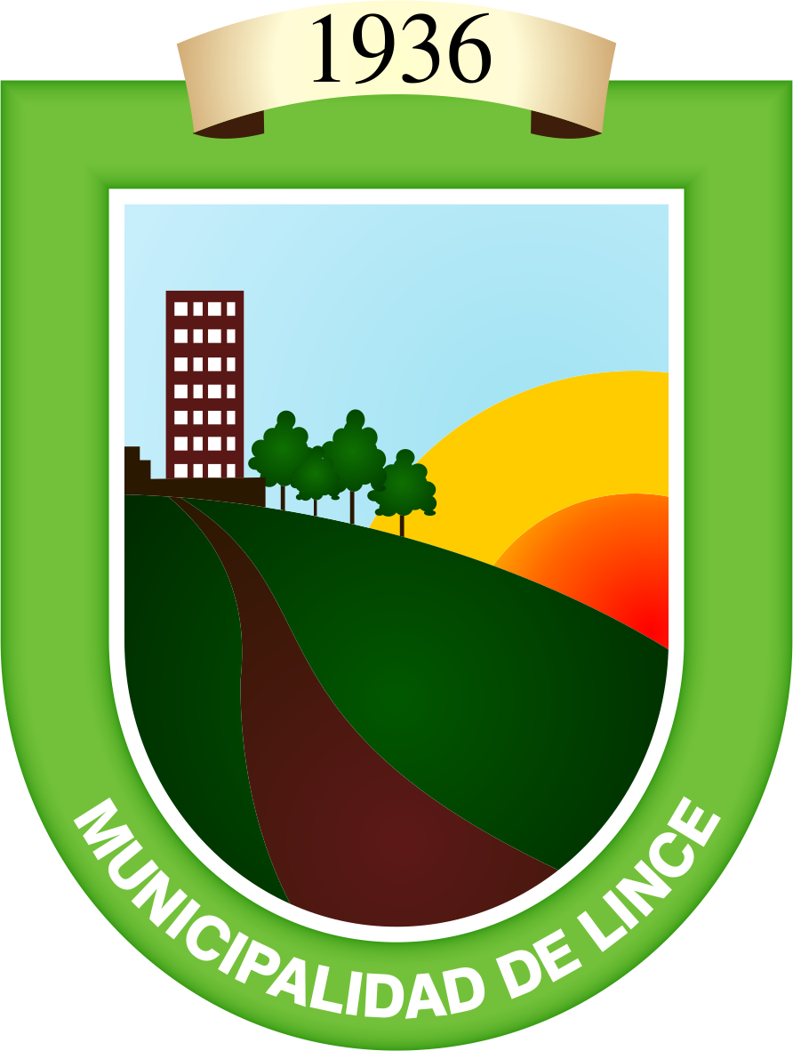 Distrito de Lince - Provincia de Lima - Región Lima